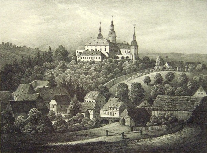 Das Schloss Purschenstein, Neuhausen im Erzgebirge, im Jahr 1841